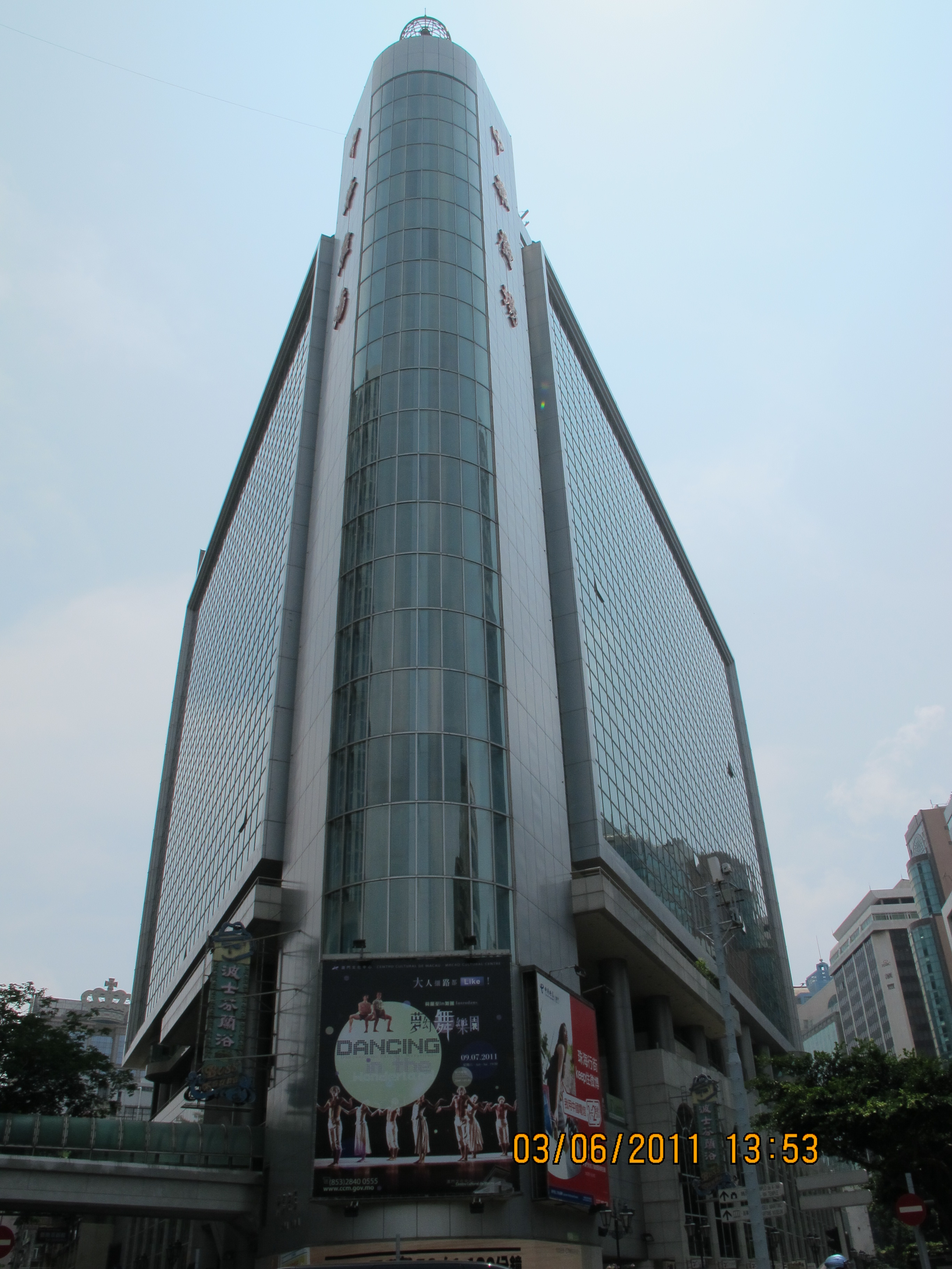 中文（香港）: 位於澳門的中華廣場